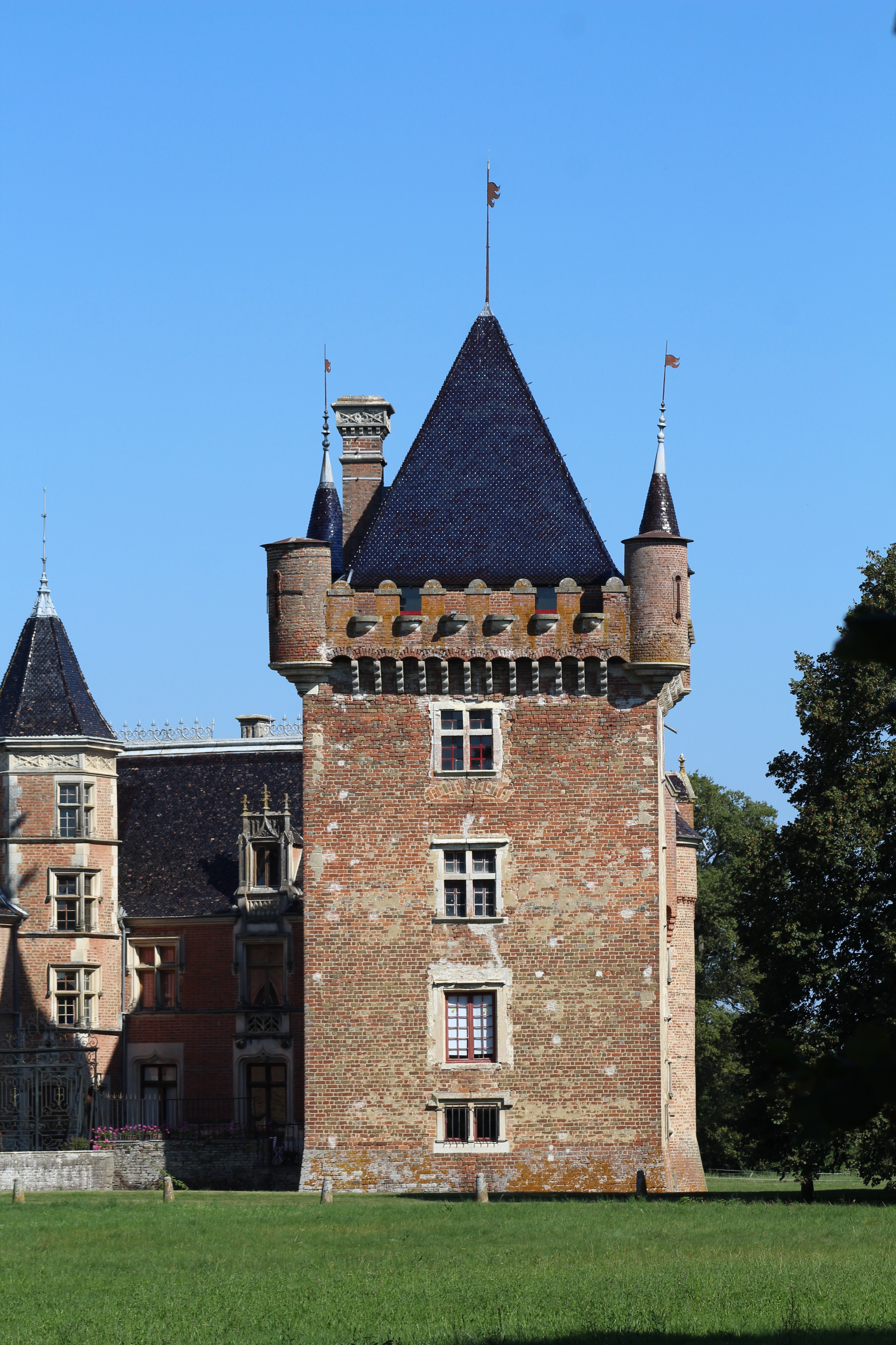 Château de Loriol à Confrançon.